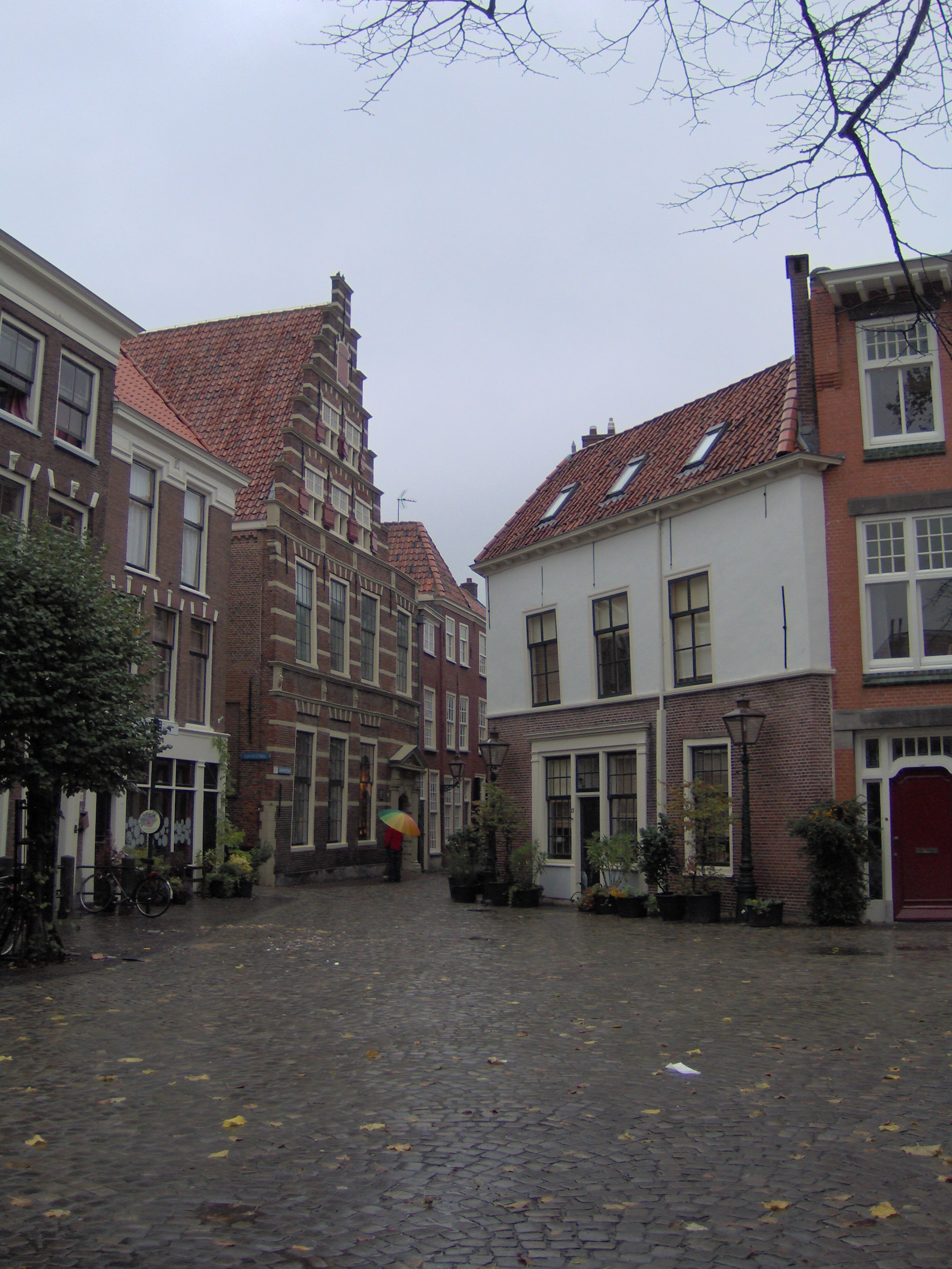 Latin School, Leiden.